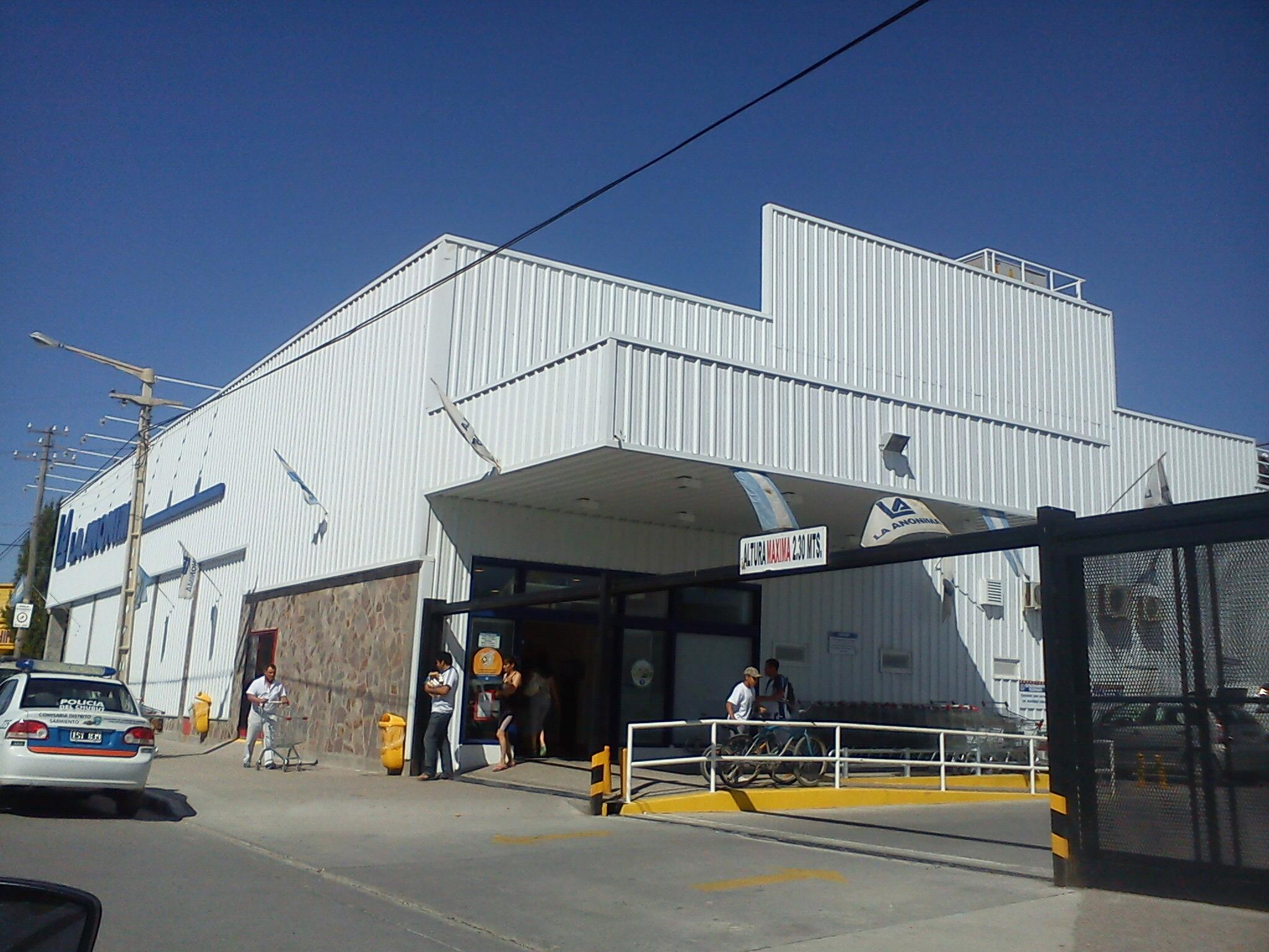 Vista de la Anonima en Sarmiento